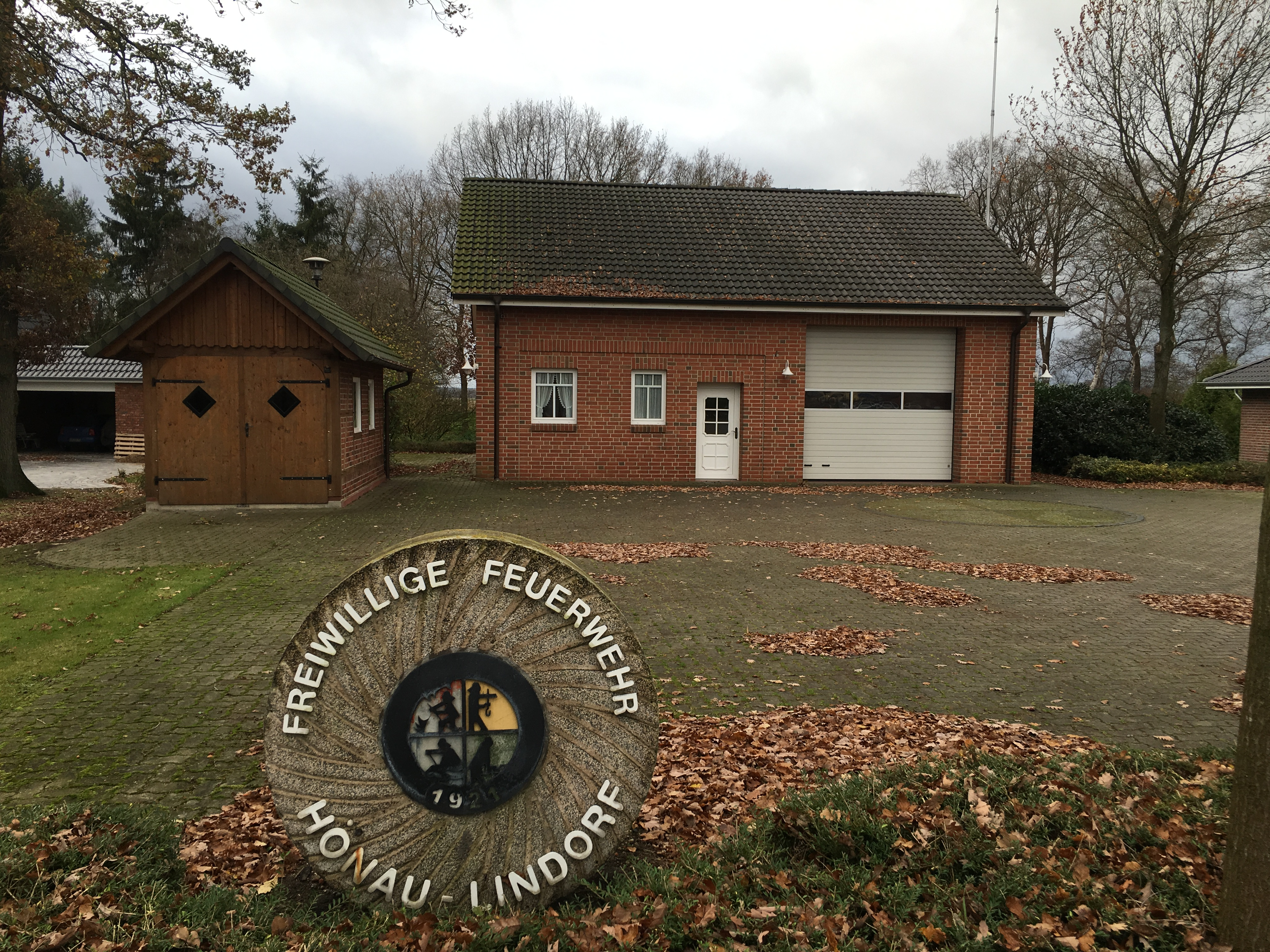 Sprüttenhuus in Hönau-Lindörp